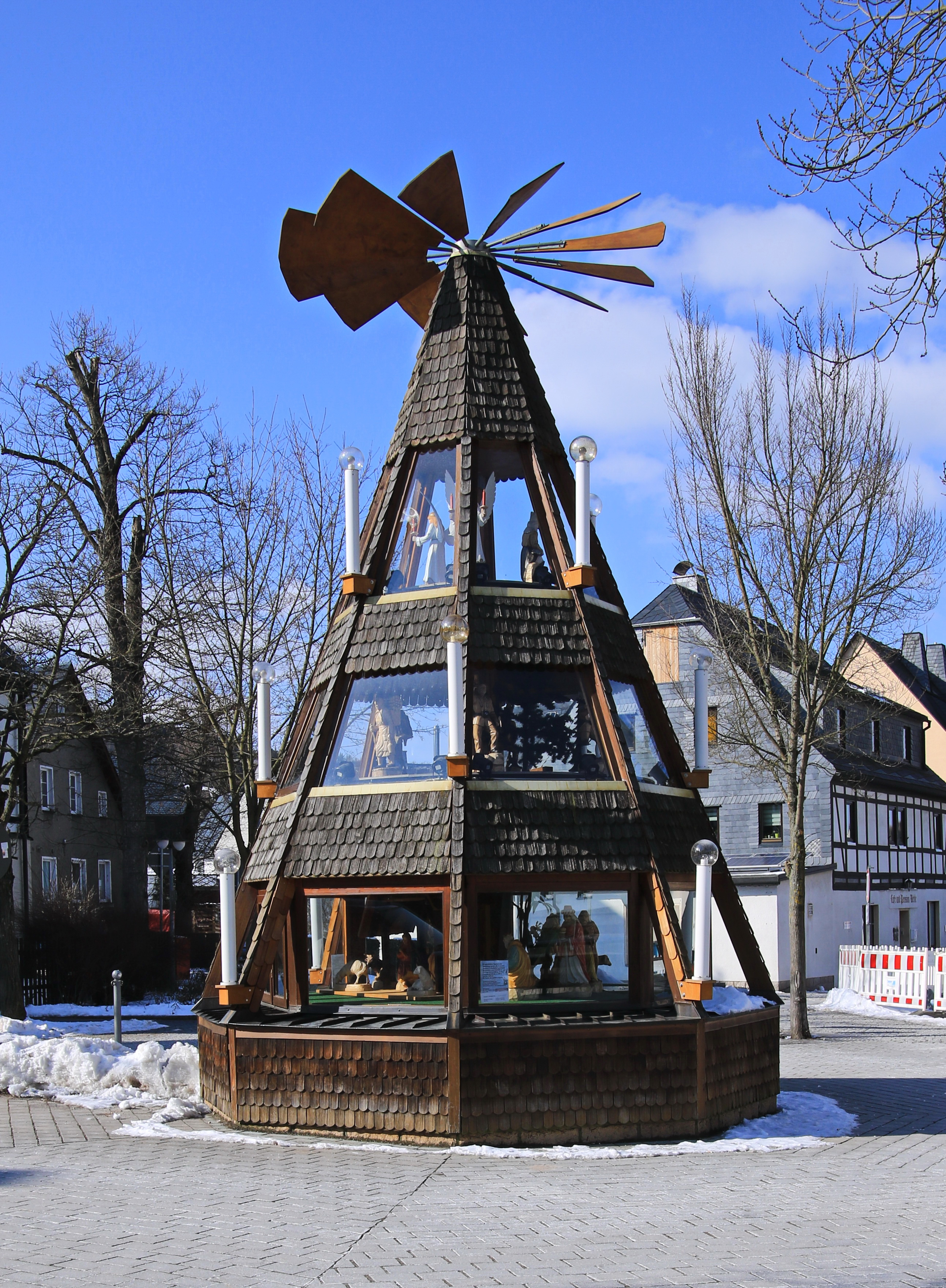 Ortspyramide in Sosa. Erzgebirgskreis, Sachsen.